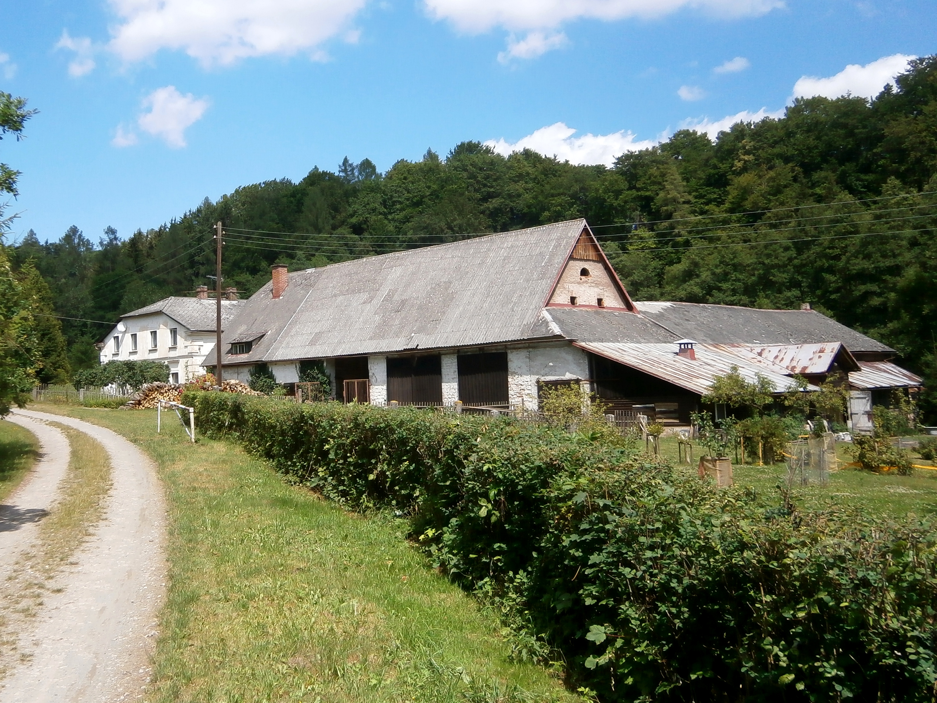 Slatinský mlýn